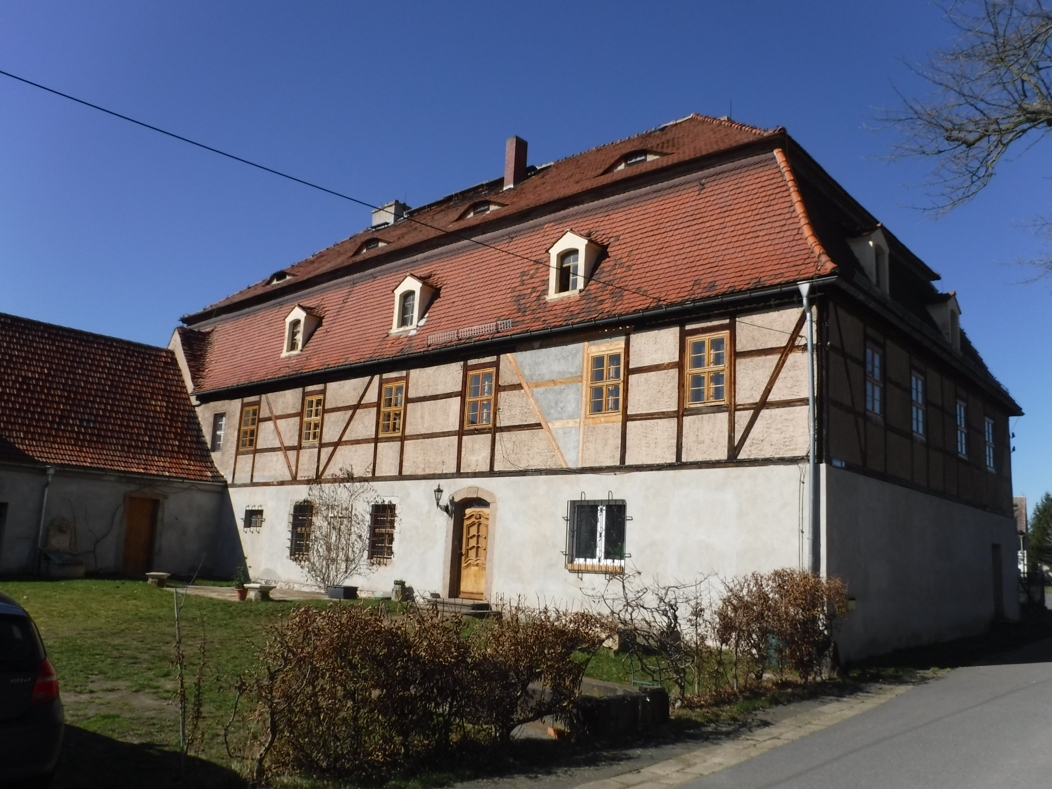 Denkmalgeschütztes Rittergut und Gutspark Röhrsdorf bei Königsbrück Ursprünglich bezeichnet mit 1826 Pächterwohnhaus (Parkstraße 33) Obergeschoss Fachwerk, Mansarddach, Dachhäuschen und Fledermausgaupen, Segmentbogenportal mit Schlussstein, bezeichnet mit „H.v.H.“